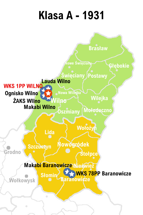 Zespoły występujące w Wileńskiej klasie A w 1931r.